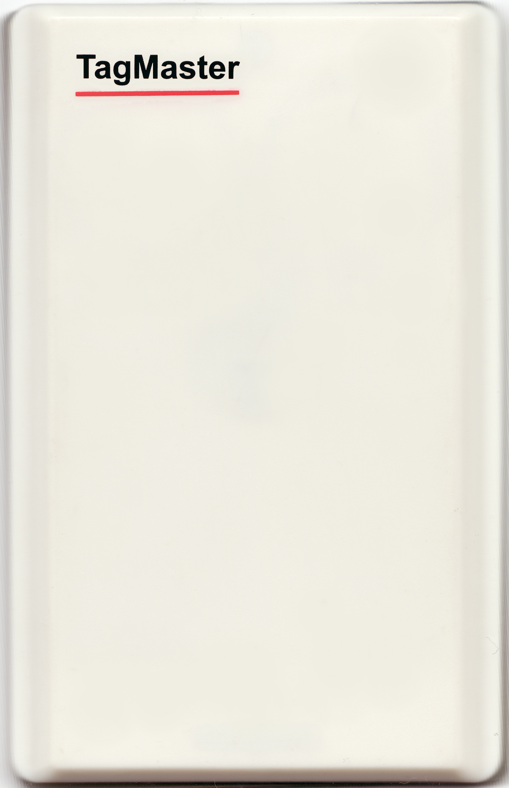 投稿者自身による作品